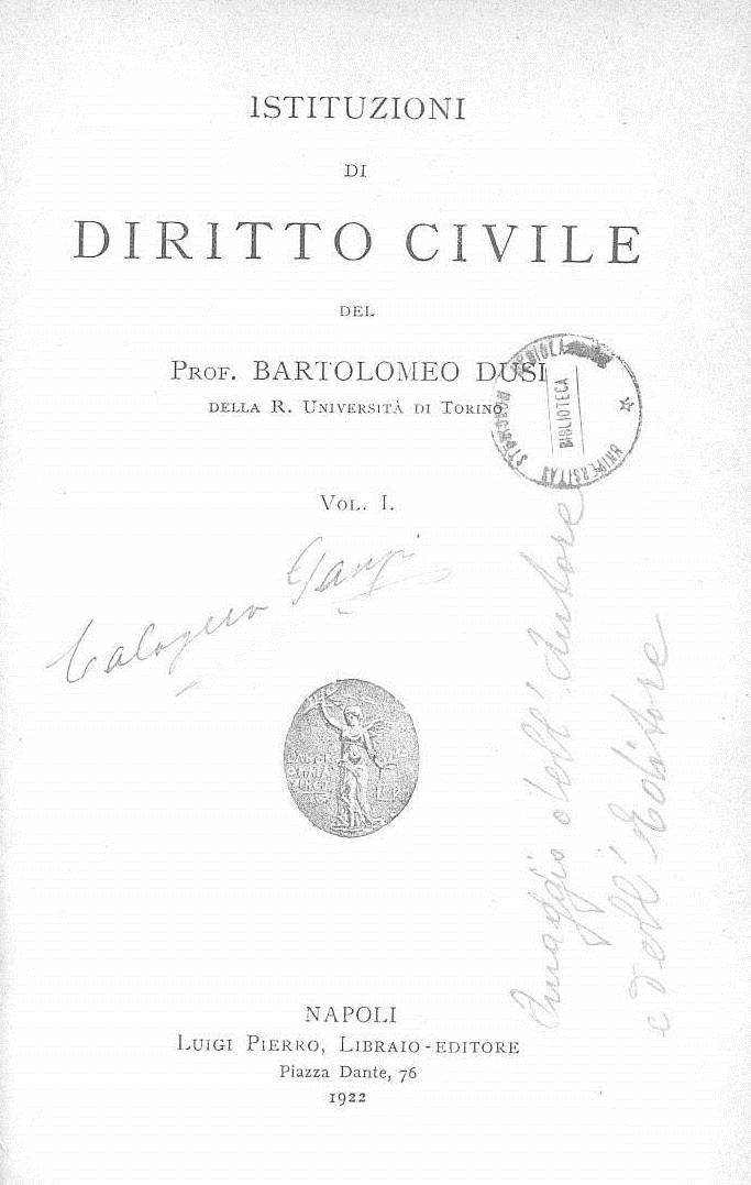 Frontespizio